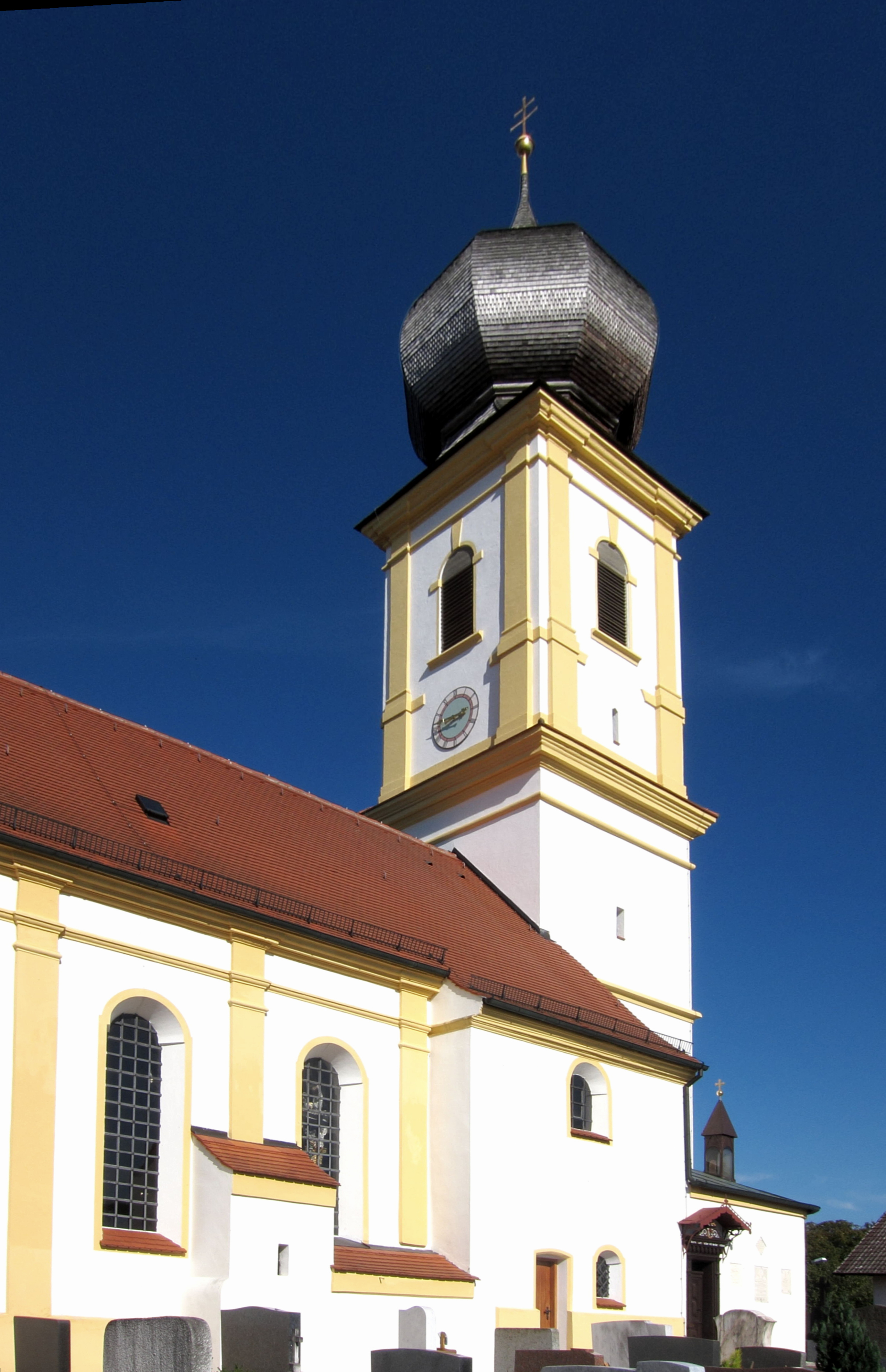 Kath. Expositurkirche St.Bartholomäus, bedeutender Bau von Anton Kogler, nach 1720; mit Ausstattung.